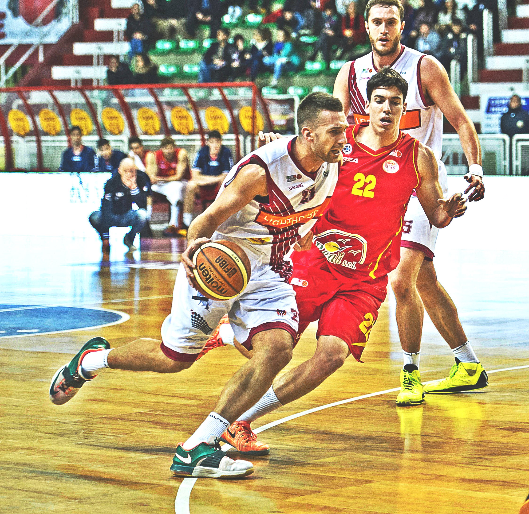 Giancarlo Ferrero, con la maglia di Trapani nel 2014/2015 in Serie A2 Gold. Giocò l'intera stagione con il ruolo di capitano.